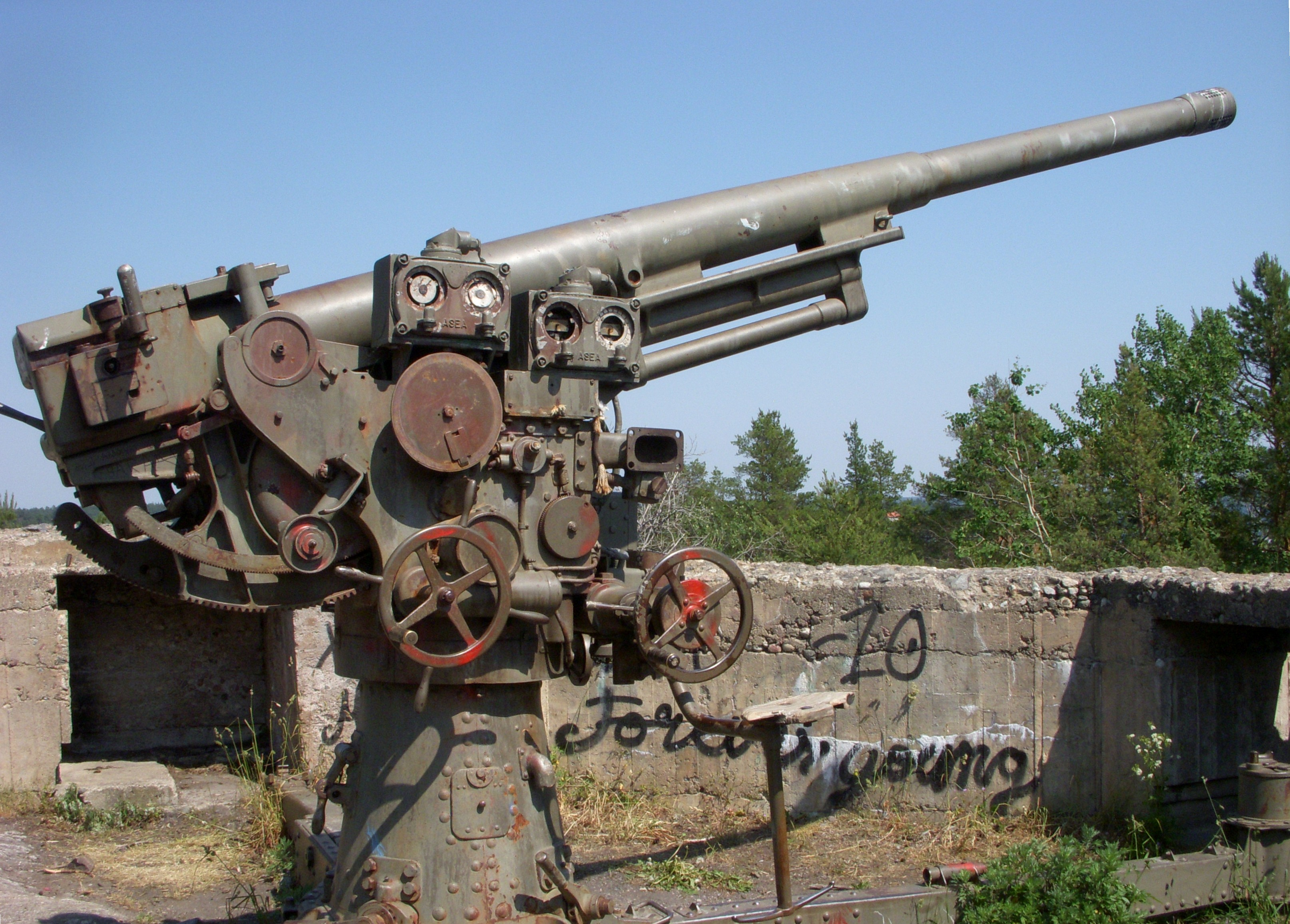 Luftvärnsbatteriet "Käppalaställningen" på Lidingö (Bofors 8 cm kanon)